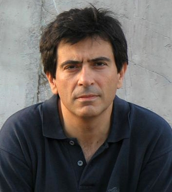 Arcadi Espada, (Barcelona, 1957).